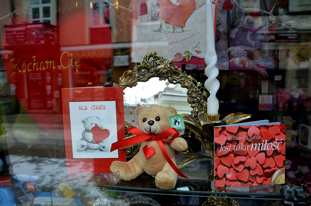 Schaufenster eines Ladens in Sanok